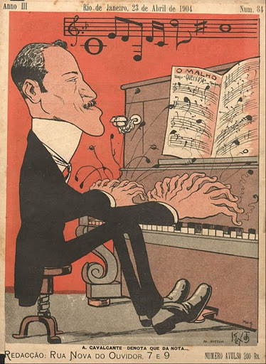 Caricatura do pianista Aurélio Cavalcanti, com a legenda "Denota que dá nota" assinado por K. Lixto, publicada na capa da Revista O Malho, em 23 de abril de 1904.